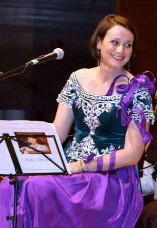 En concert